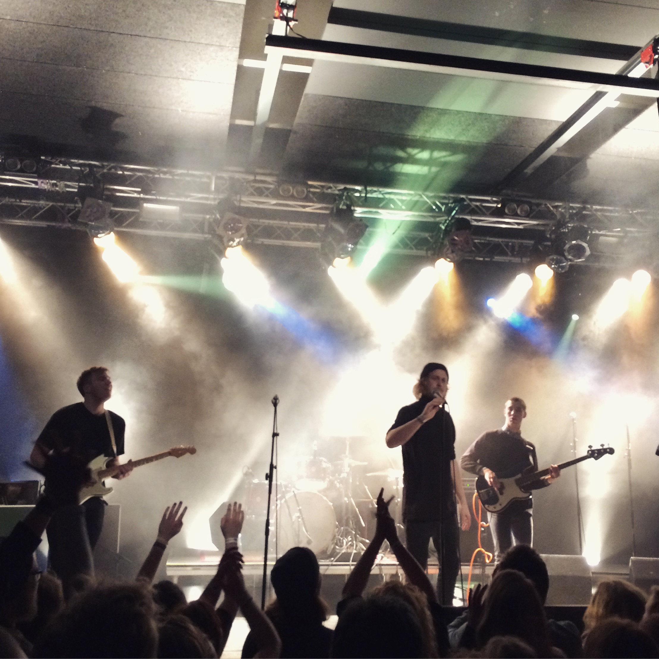 Releasekoncert med Etagen Under på Posten, marts 2015